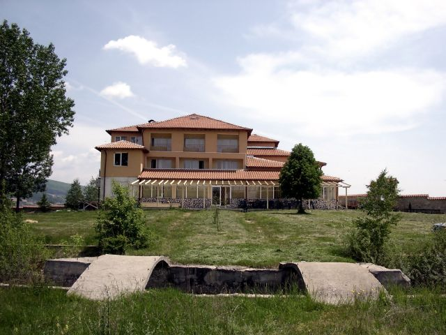 Хотел в Абланица, Област Благоевград